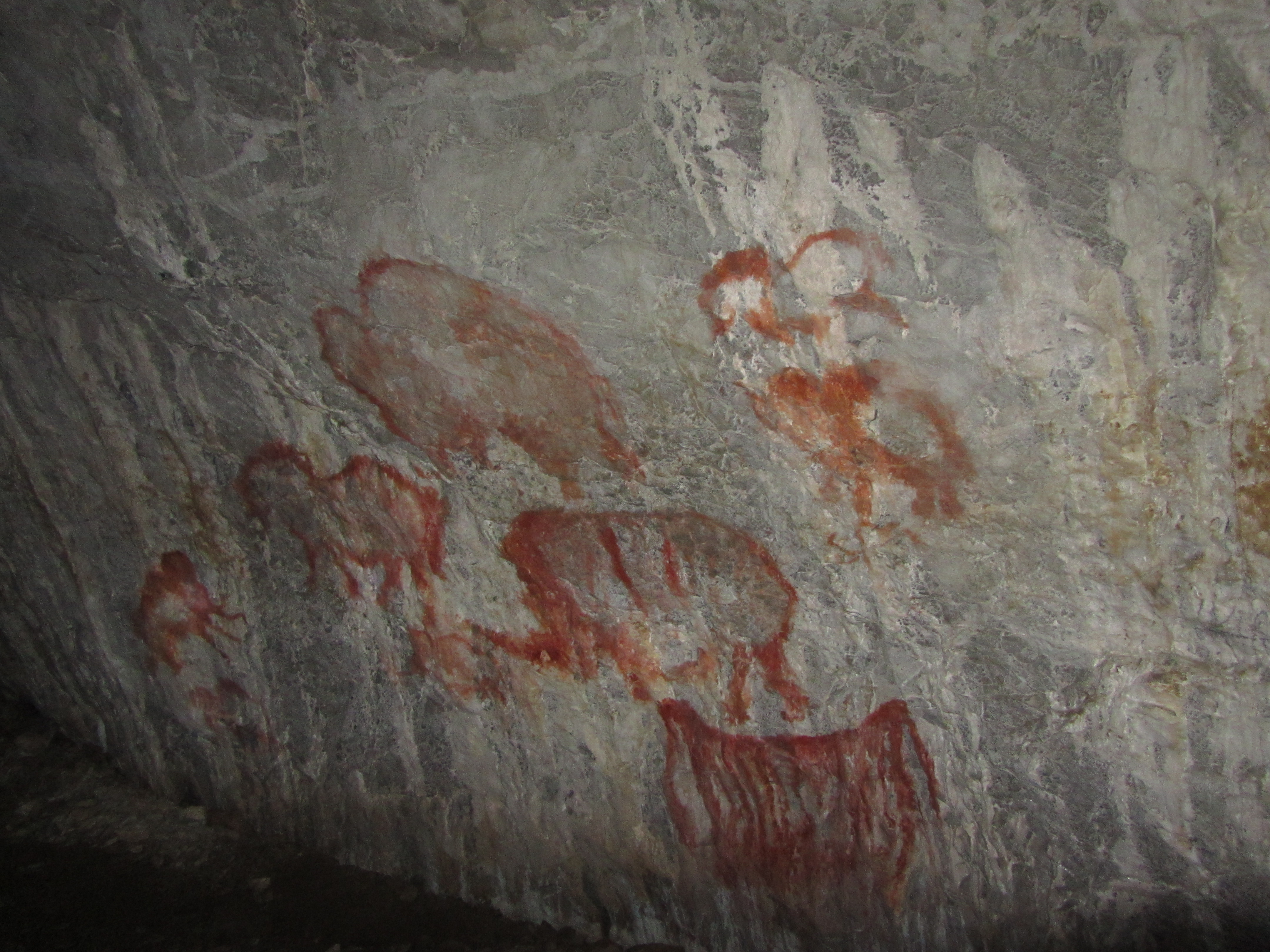 Башҡортса: Шүлгәнташ мәмерйәһендә рәсемдәр күсрмәһе